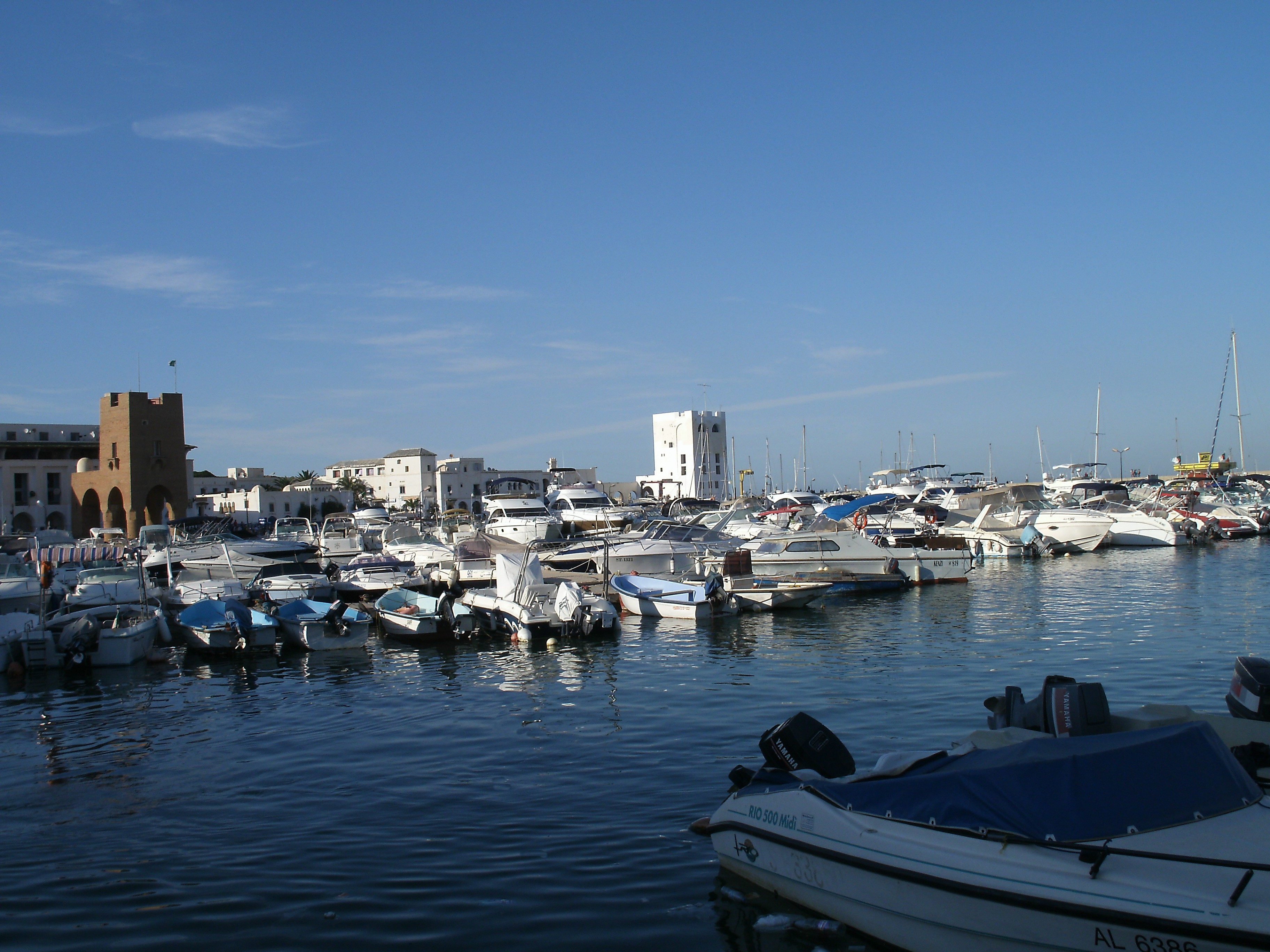 Port de plaisance de Sidi Ferruch